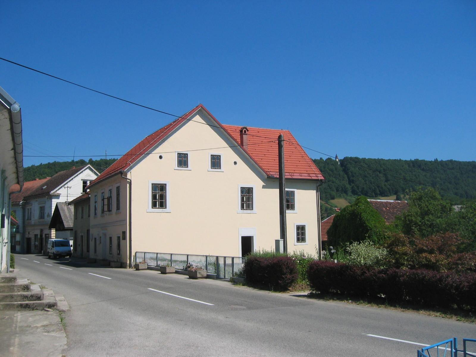 Birth-house of slovenian poet Oton Župančič in Vinica, Slovenia. photo:Ziga 20:57, 18 August 2006 (UTC)